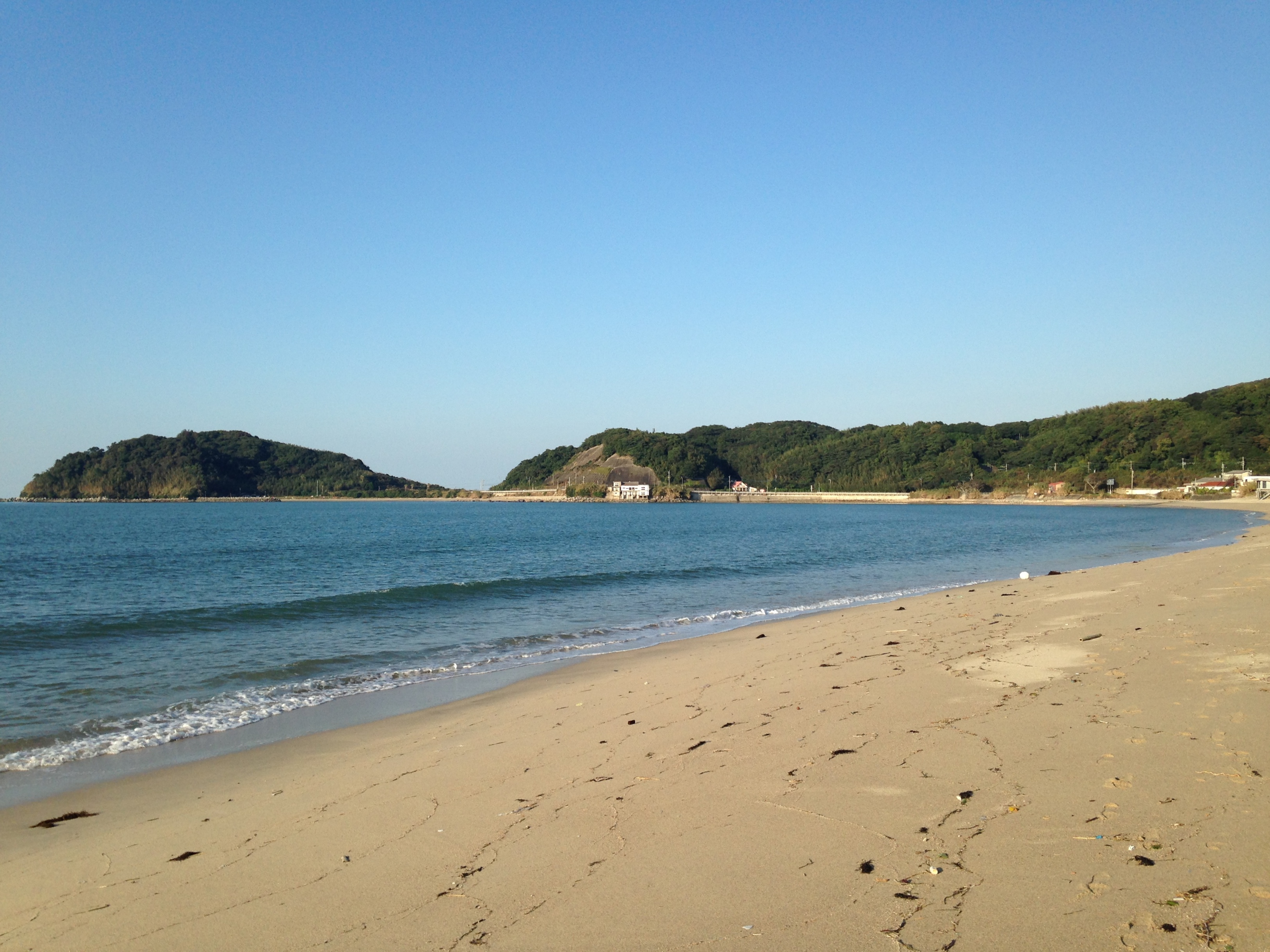 鹿家海水浴場より望む串崎と鹿家漁港